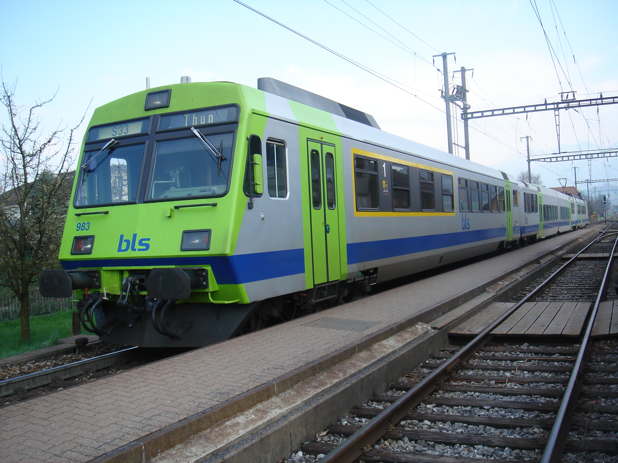 BLS NPZ RBDe 565 726 - B Jumbo - ABt 50 63 39-33 983 in Thurnen, Gürbetal